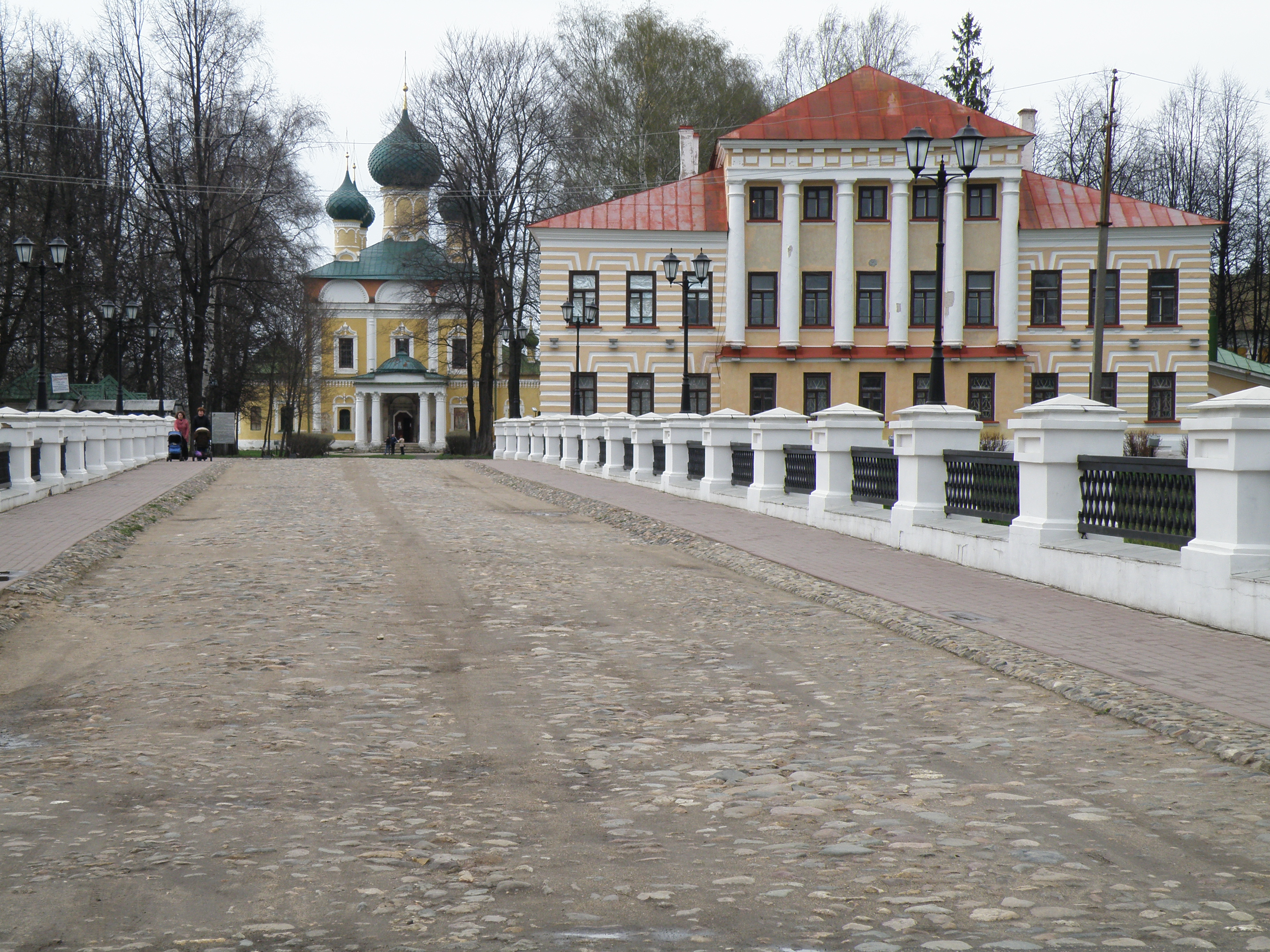 Вид на Угличский кремль с Успенской площади: Спасо-Преображенский собор и Дом градоначальника (позднее городской думы)